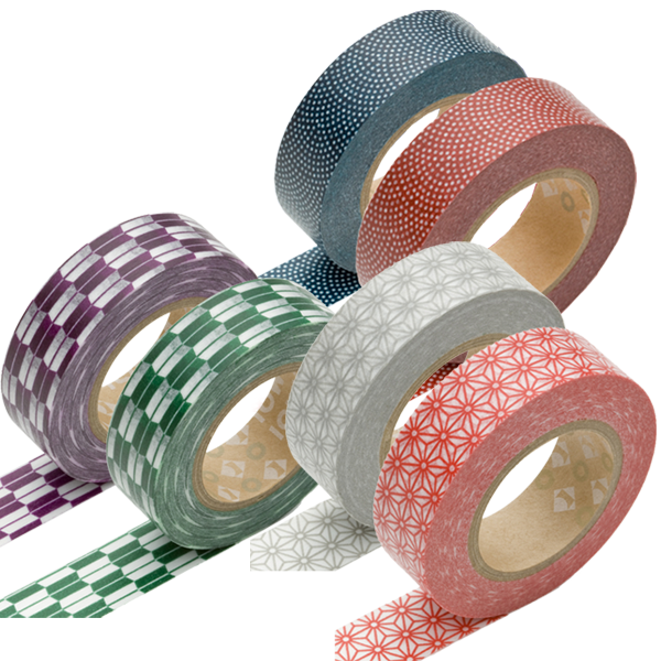 Japanisches Reispapierklbeband - Washi-Tape